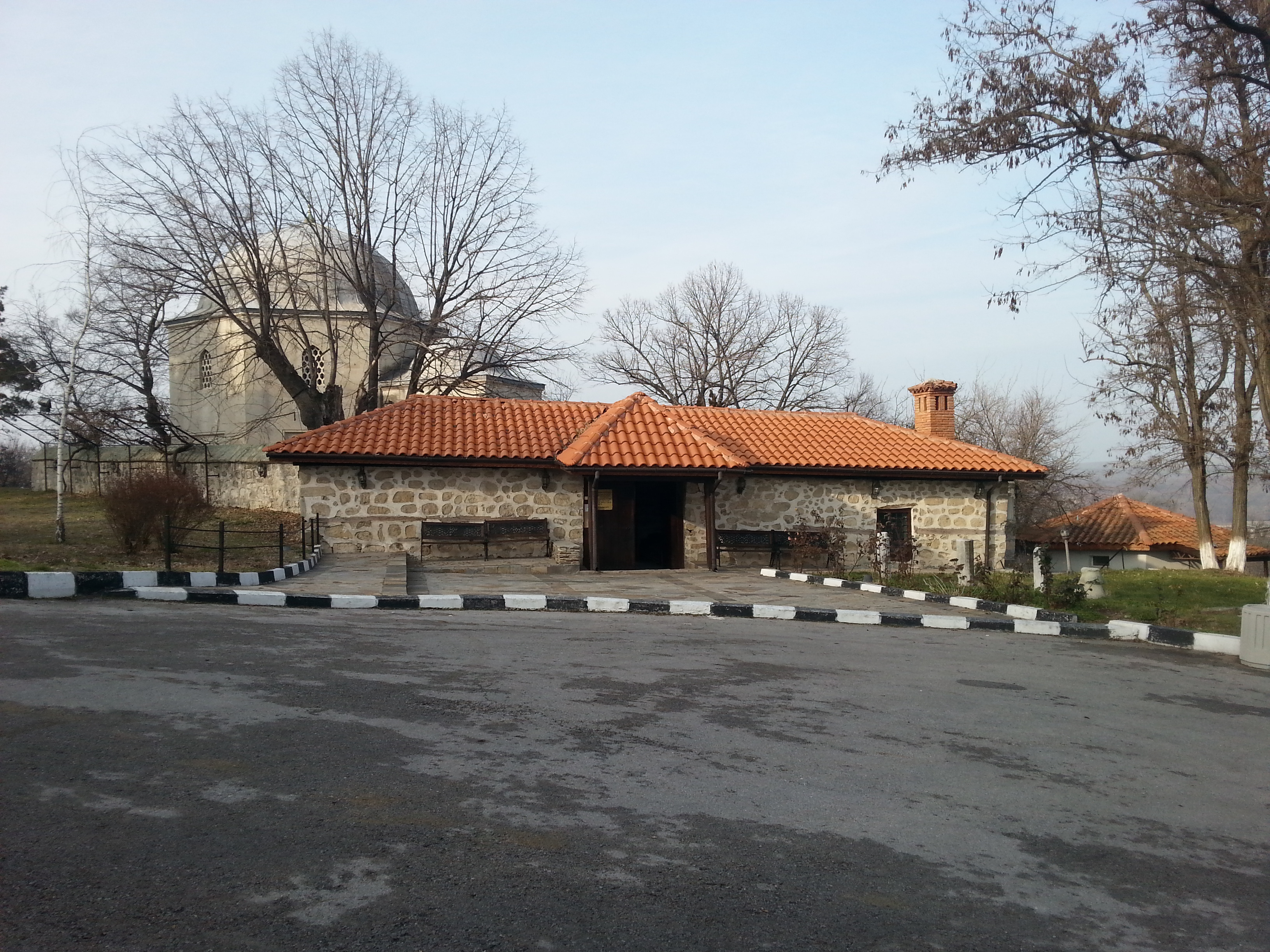 Входа на тюрбето "Отман баба"